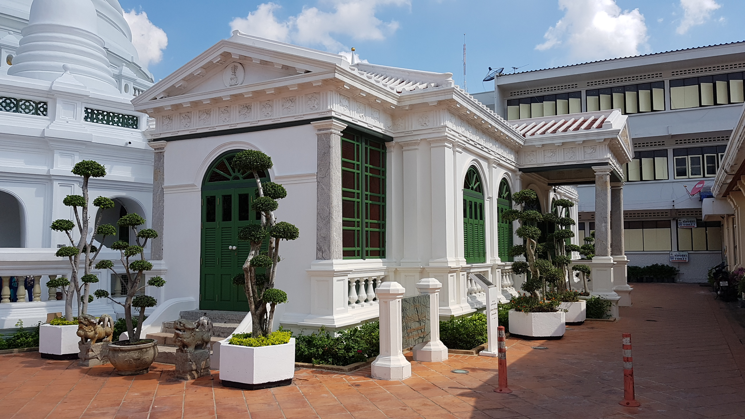 พิพิธภัณฑ์พระประยูรภัณฑาคาร